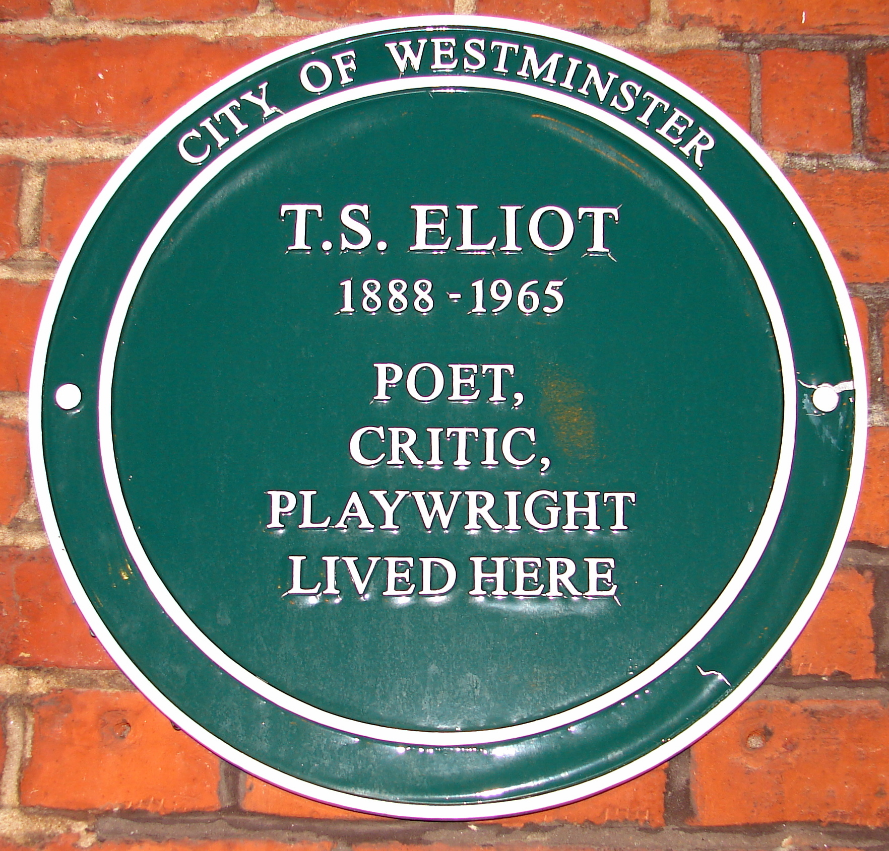 T.S. Eliot